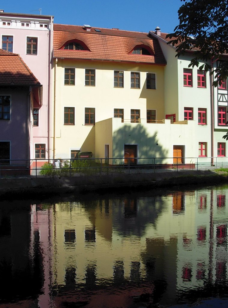 Ulica Przyrzecze w Bydgoszczy, Wenecja Bydgoska